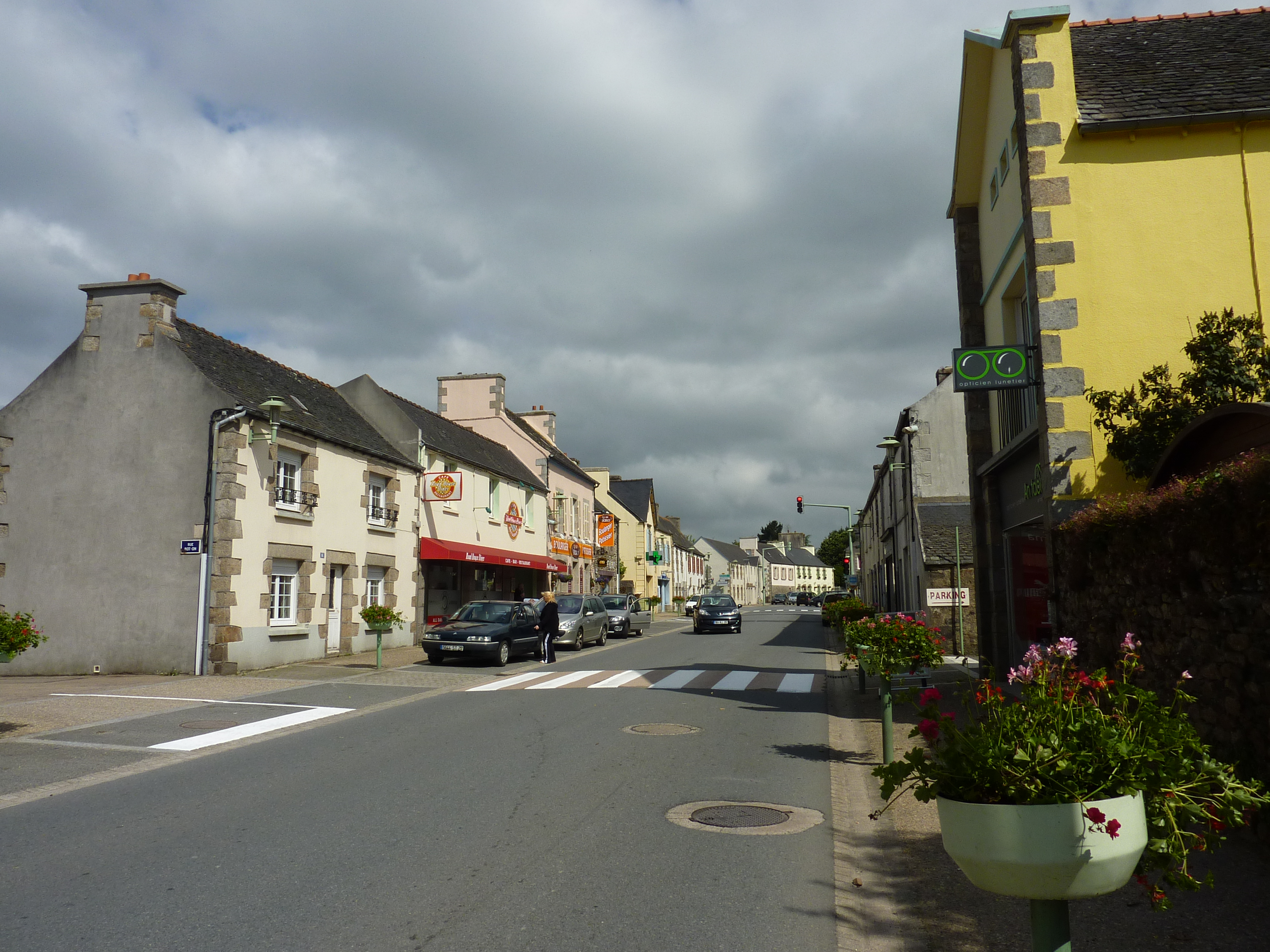 Pleyber-Christ: la rue principale (route Quimper-Morlaix)